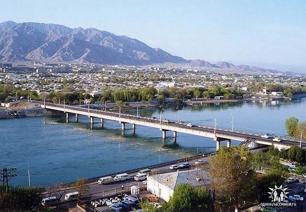 Тоҷикӣ: Сирдарё. пули шаҳри Хуҷанд ки соҳилҳои Сирдарёро пайваст мекунад